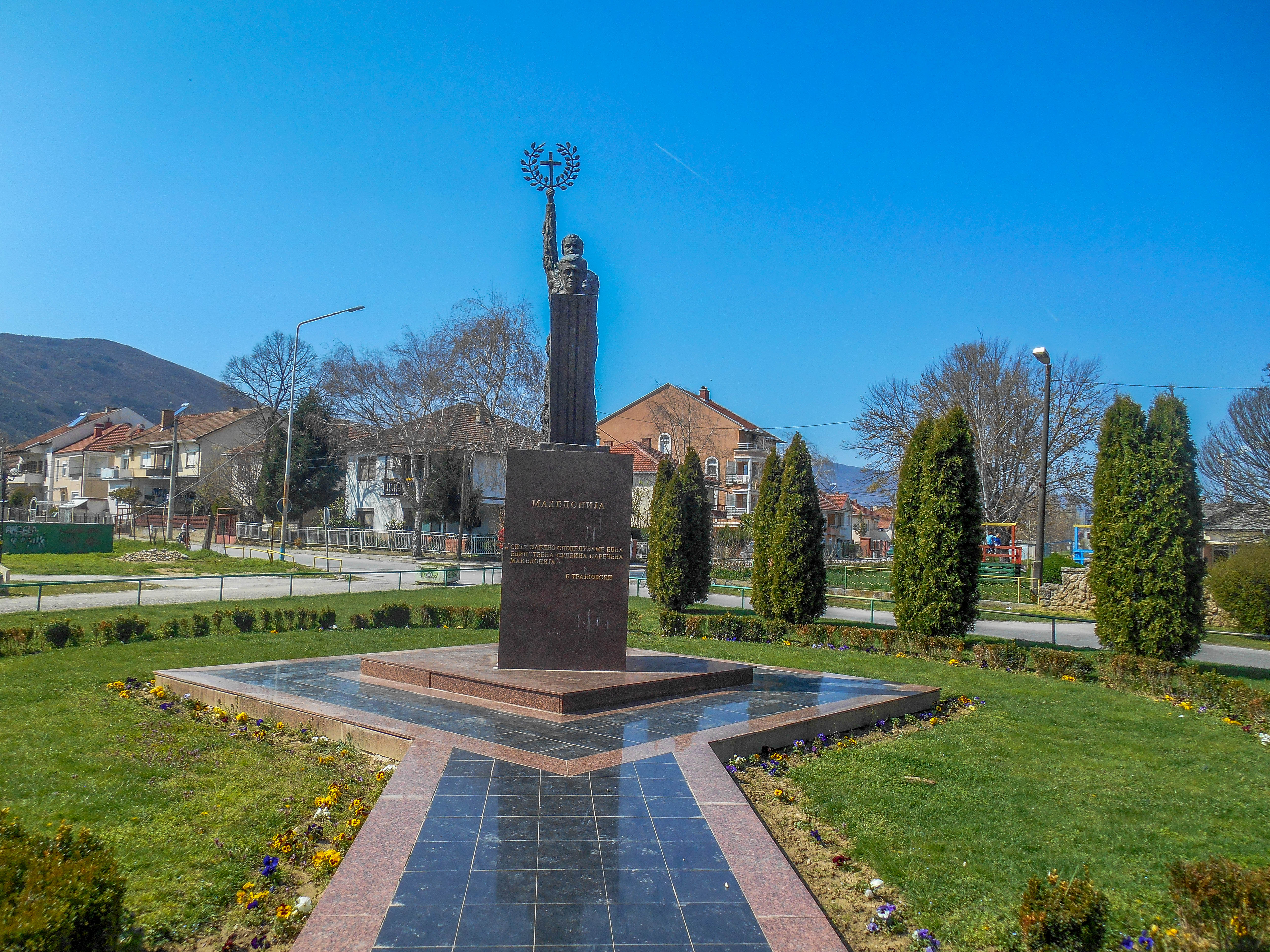 Споменик Македонија